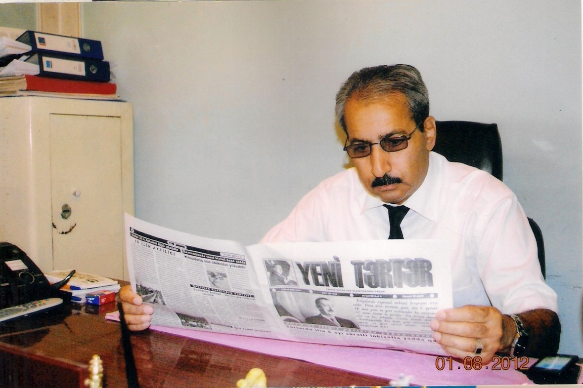 Tofiq Yusif